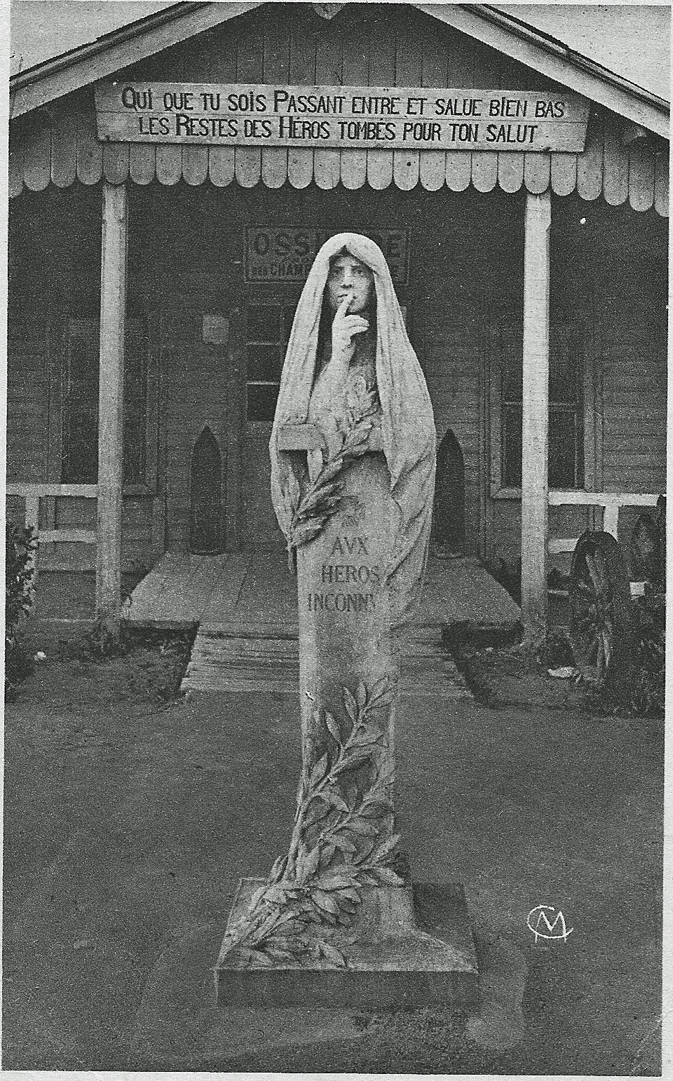 Ossuaire_provisoire, une_statue_de_la_Résignation_Berthe_Girardet. Carte postale de 1920.